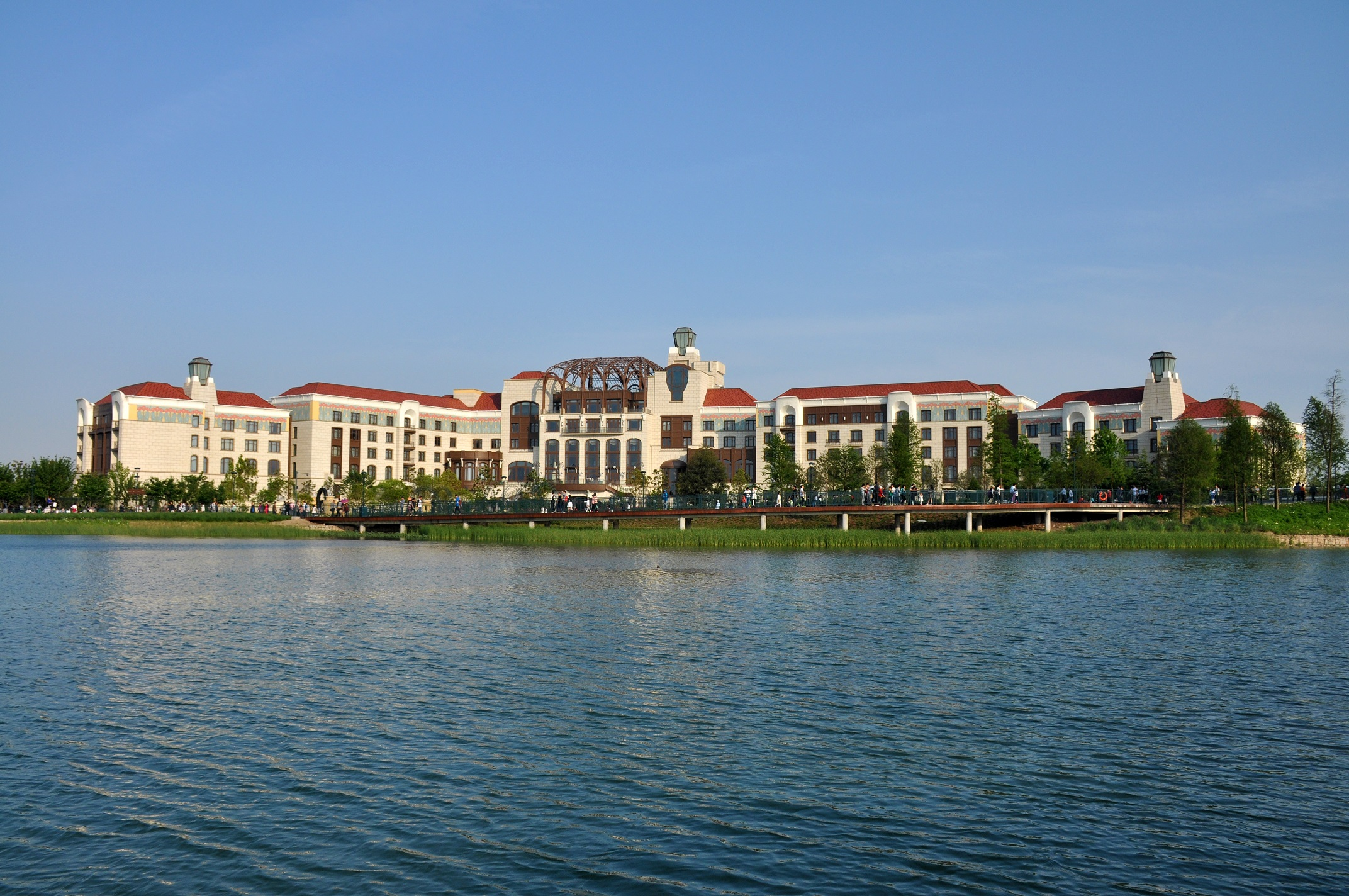 中文（中国大陆）: 上海迪士尼乐园酒店